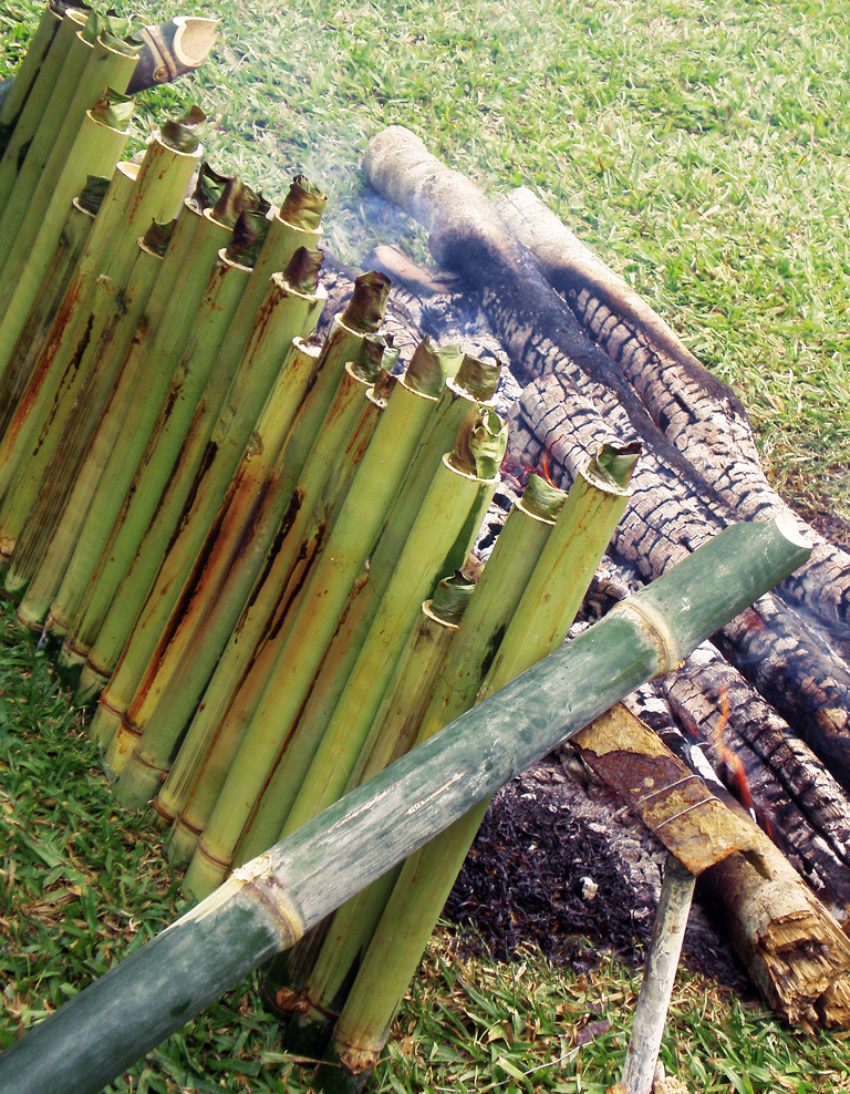 Lemang